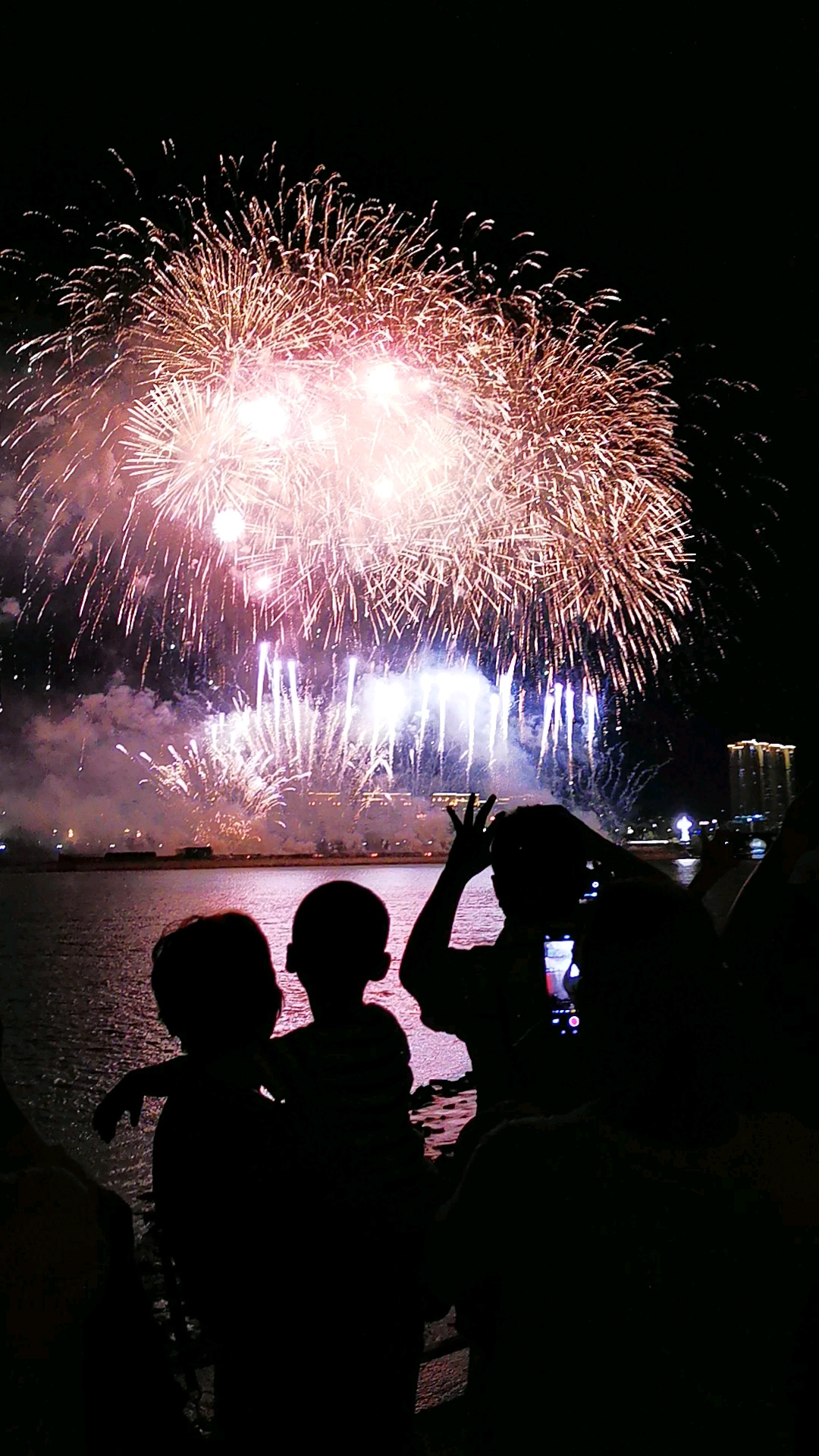 中文（中国大陆）: 2019年9月30日，福州闽江两岸举办国庆焰火晚会